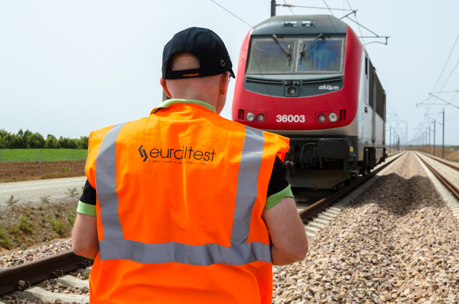 Les équipes Eurailtest réalisent des essais sur la LGV au Maroc en 2017